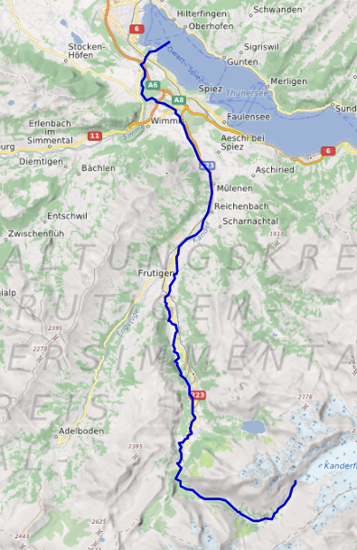 Carte réalisée sur umap This map may be incomplete, and may contain errors. Don't rely solely on it for navigation.